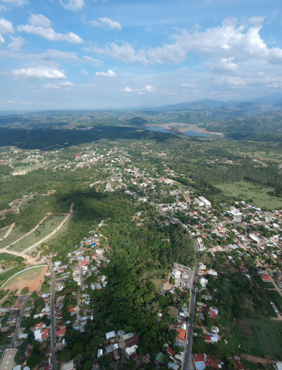 vista aérea de monción